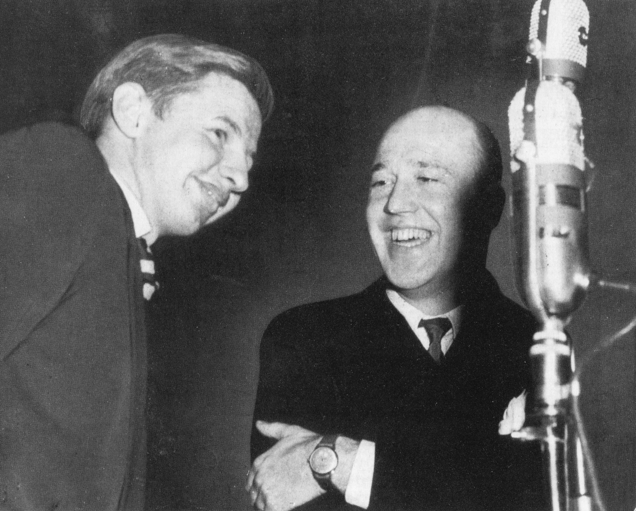 Snoddas Nordgren är gäst hos Lennart Hyland i Karusellen 1952. Inspelningen skedde i Karlaplansstudion på Östermalm.